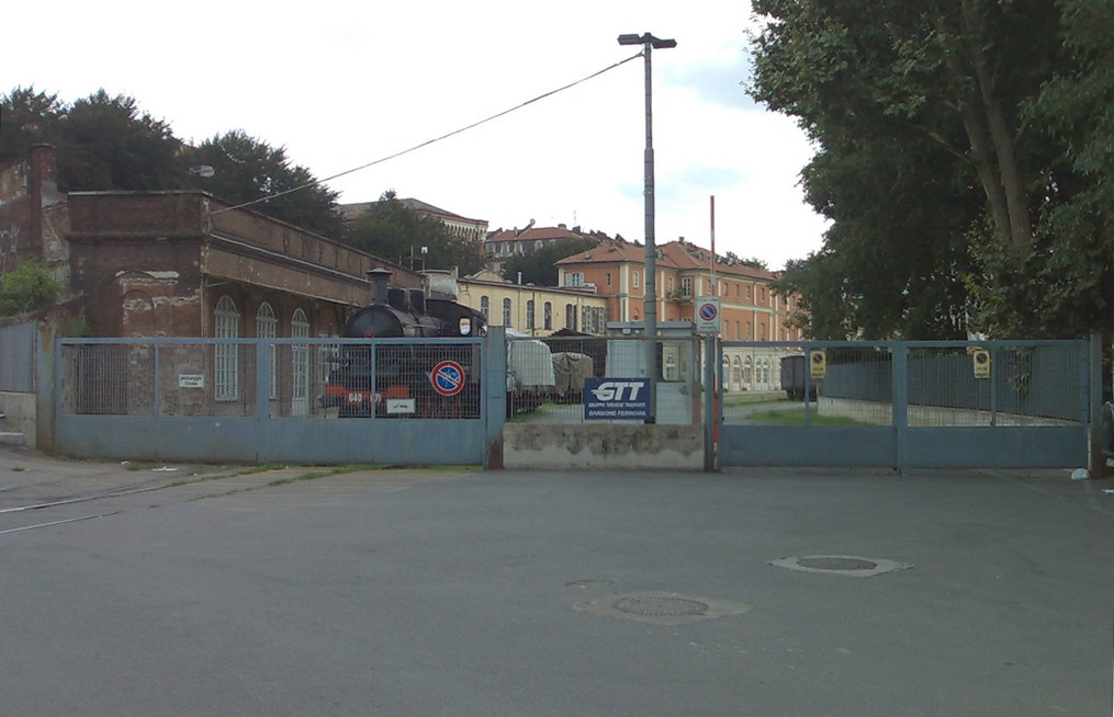 Ingresso piano del ferro dell'ex Stazione Ciriè - Lanzo ora sede Museo Ferroviario Piemontese ed officina GTT